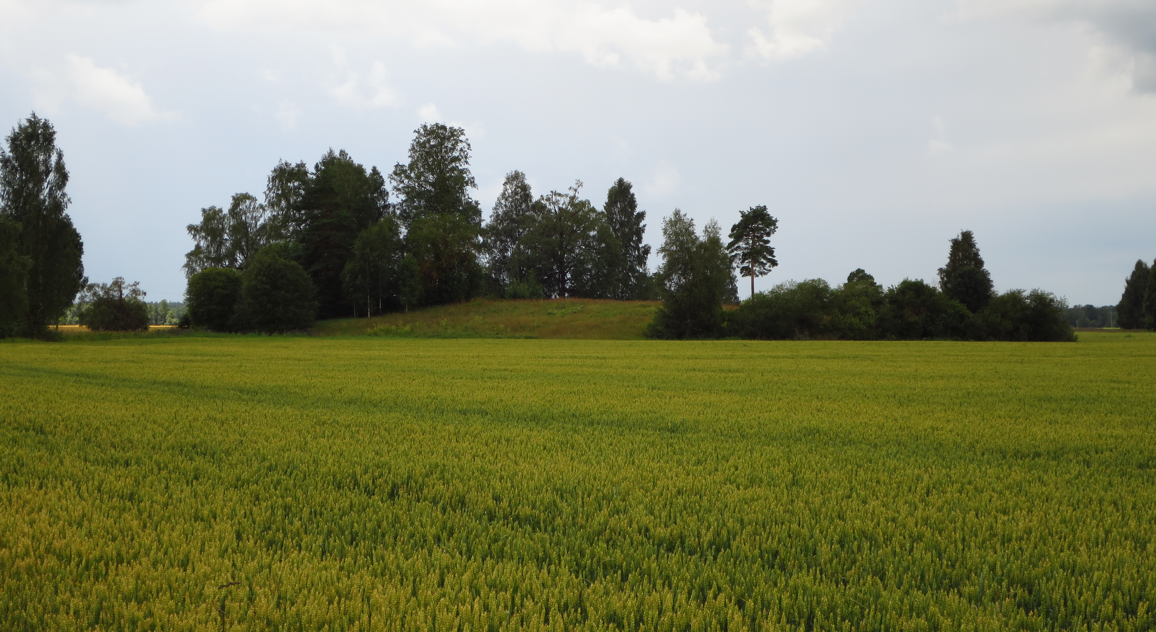 Vaade Kunda Lammasmäele Sõmeru-Kunda maanteelt